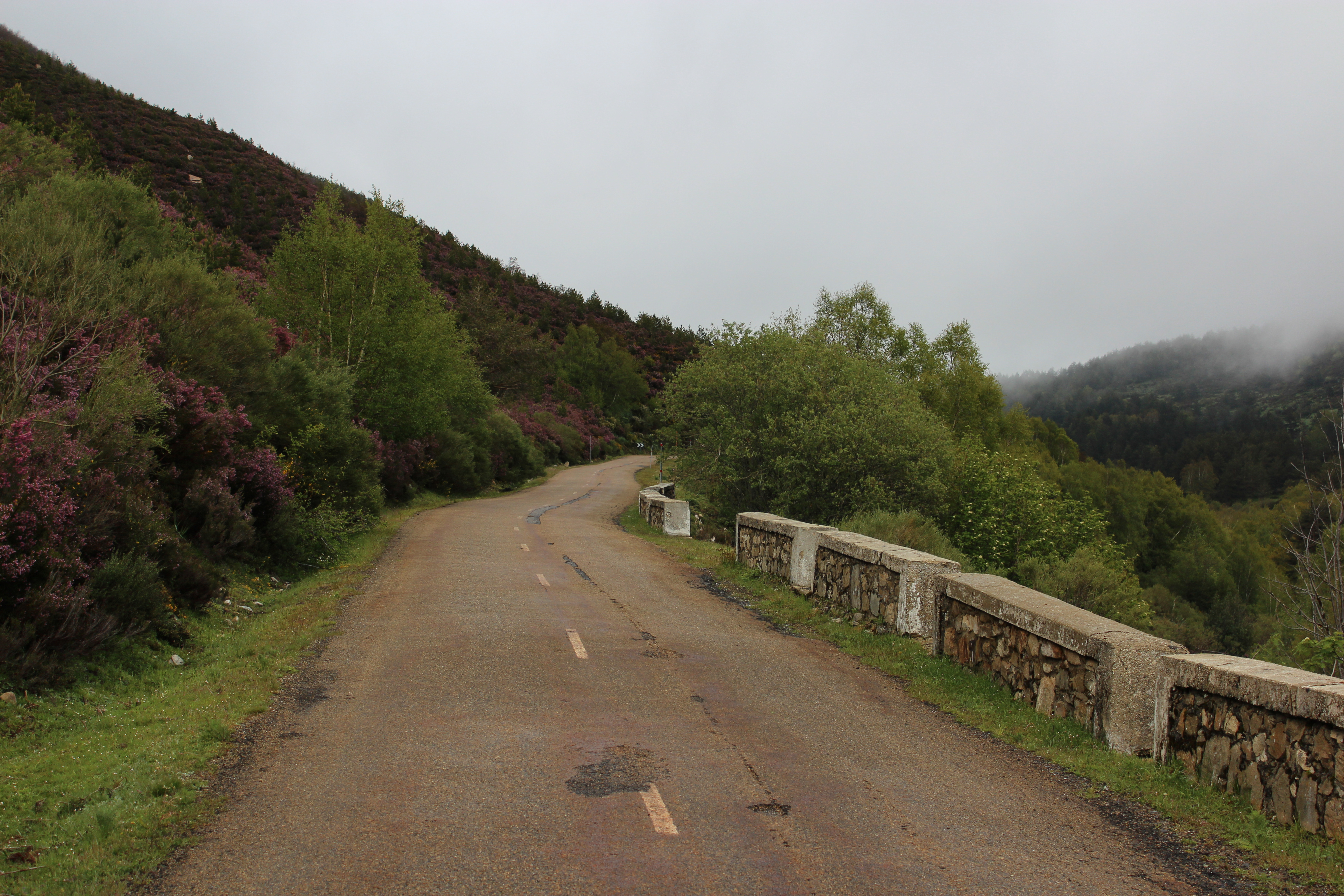 Carretera LE-333 a la altura del pinar de Lillo.